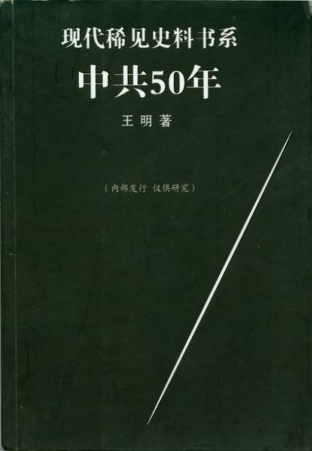 中文（中国大陆）: 王明撰写的《中共五十年》。2004年3月，东方出版社出版，内部限量发行